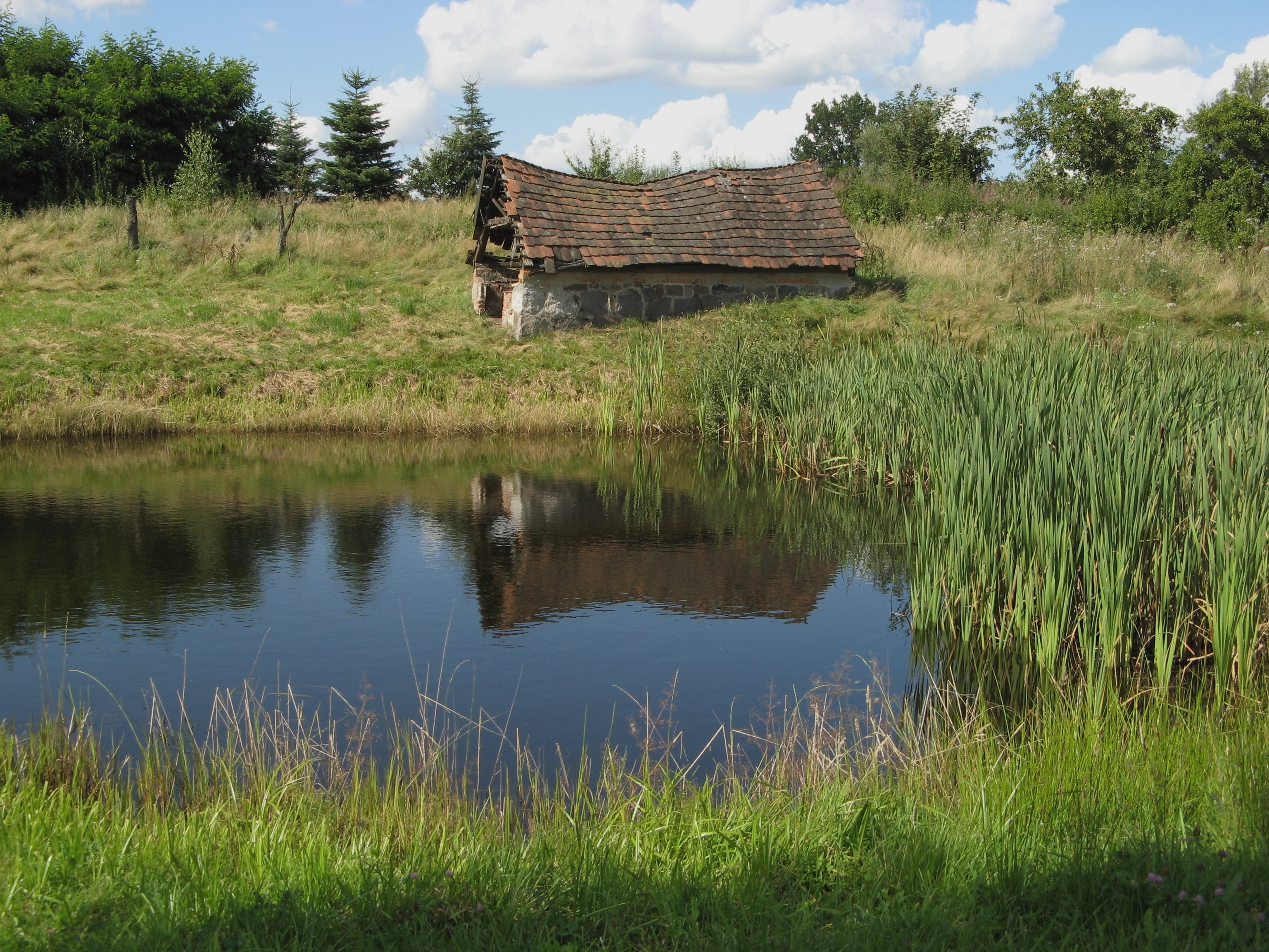 Czarnkowie - przy domu